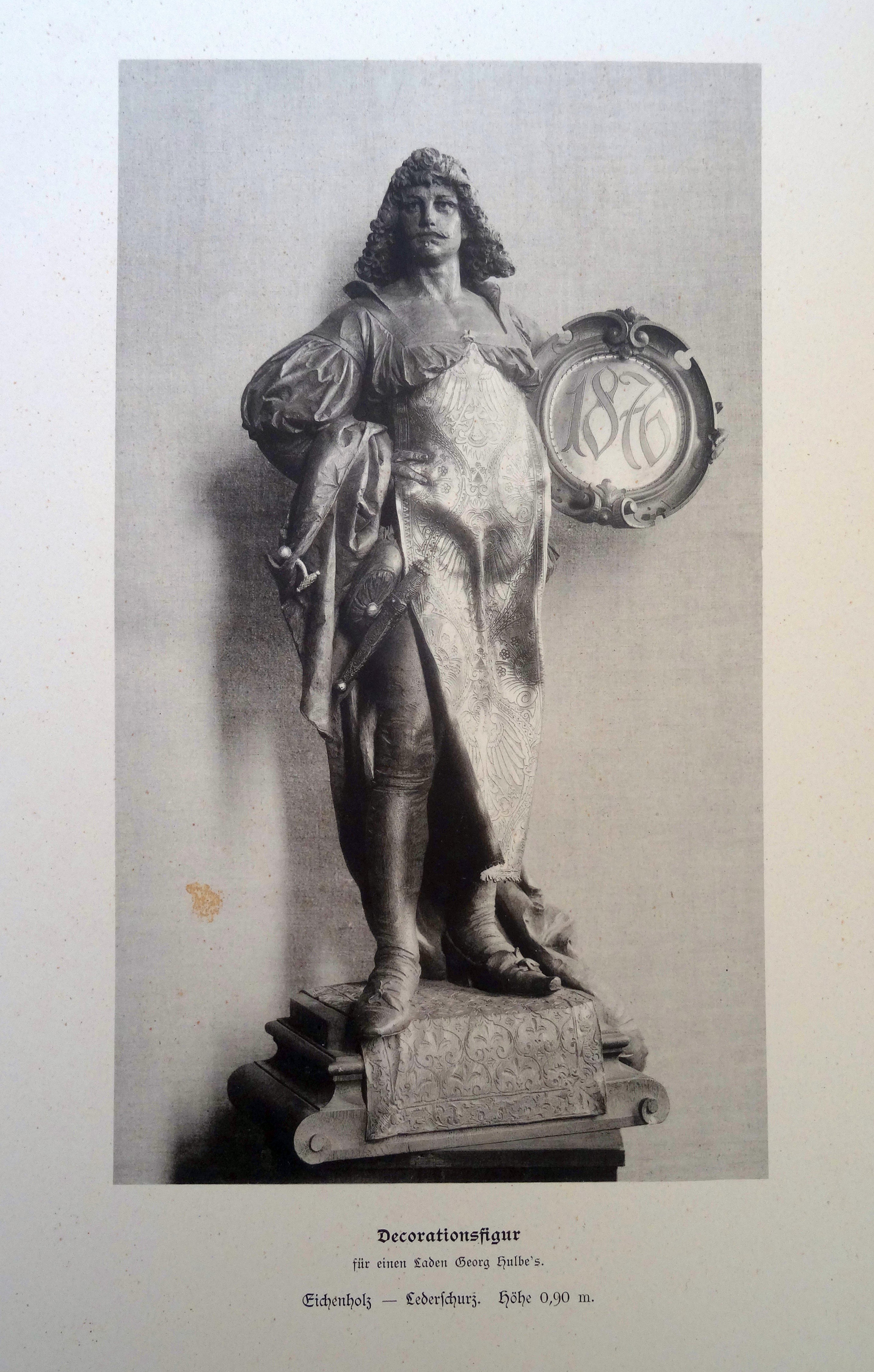 Aloys Denoth: Dekorationsfigur für einen Laden Georg Hulbes. Eichenholz und Lederschurz. 0,90 m hoch